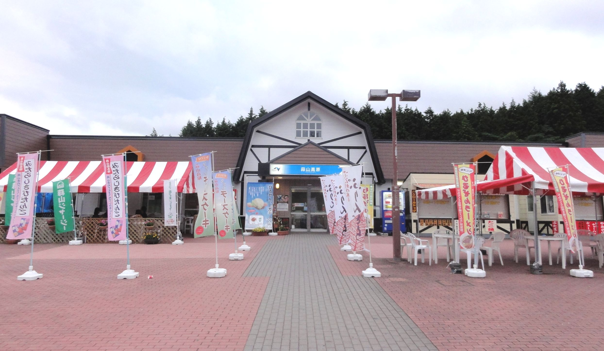 蒜山高原サービスエリア